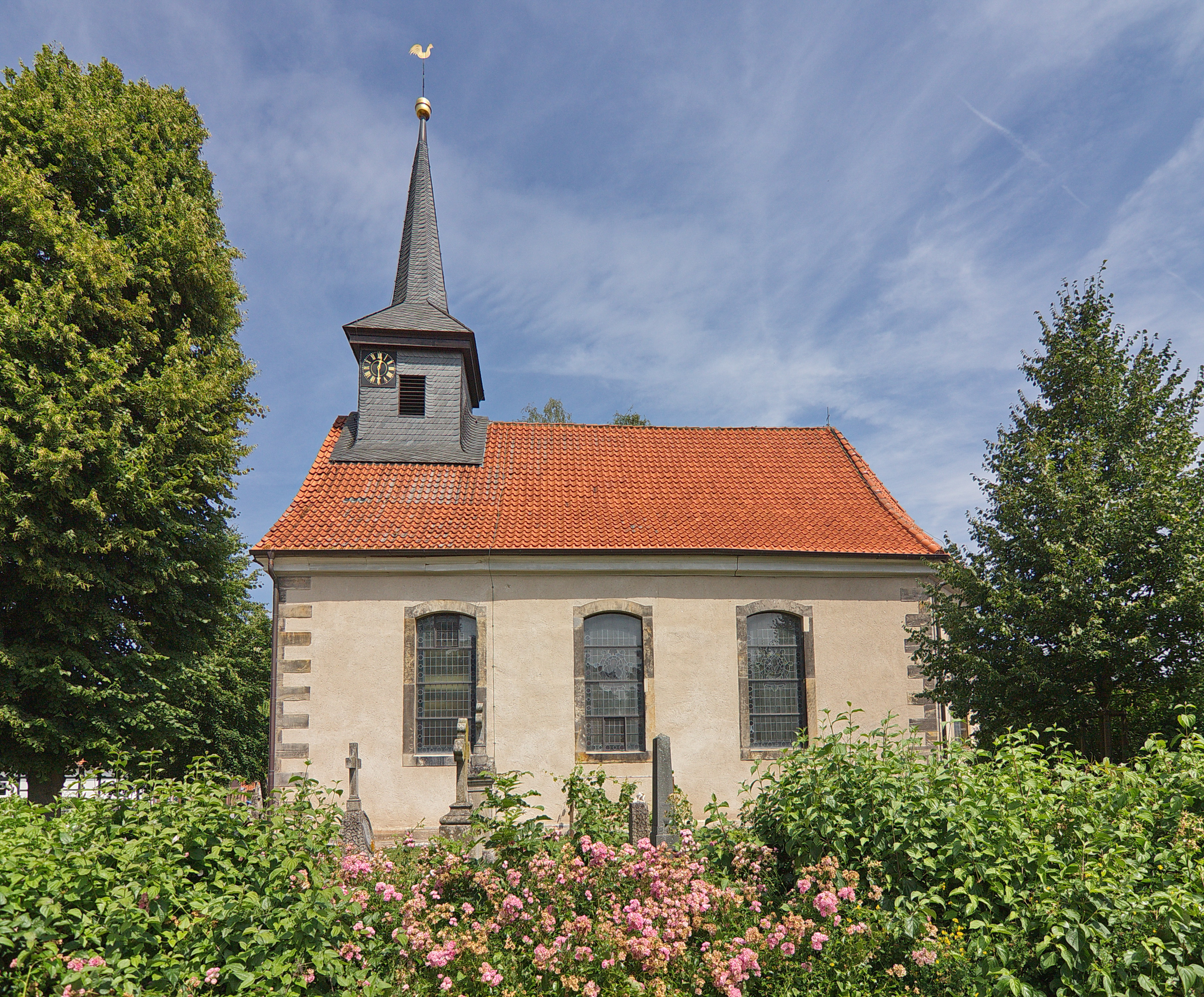 St.-Michael-Kirche in Wehmingen (Sehnde), Niedersachsen, Deutschland